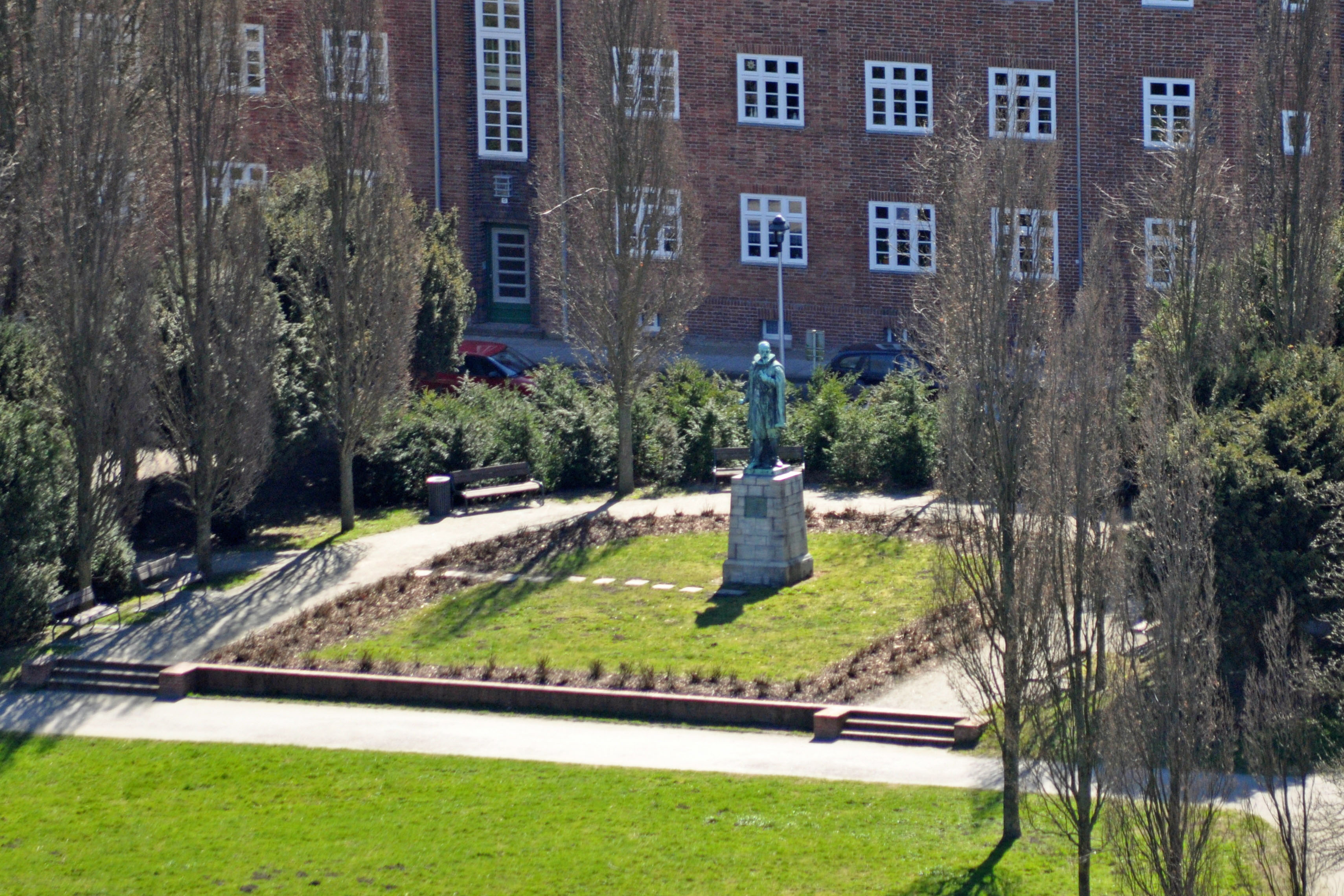 Gebäude bzw. Gebäudedetail in Stralsund. Straße und Hausnummer siehe Dateiname.